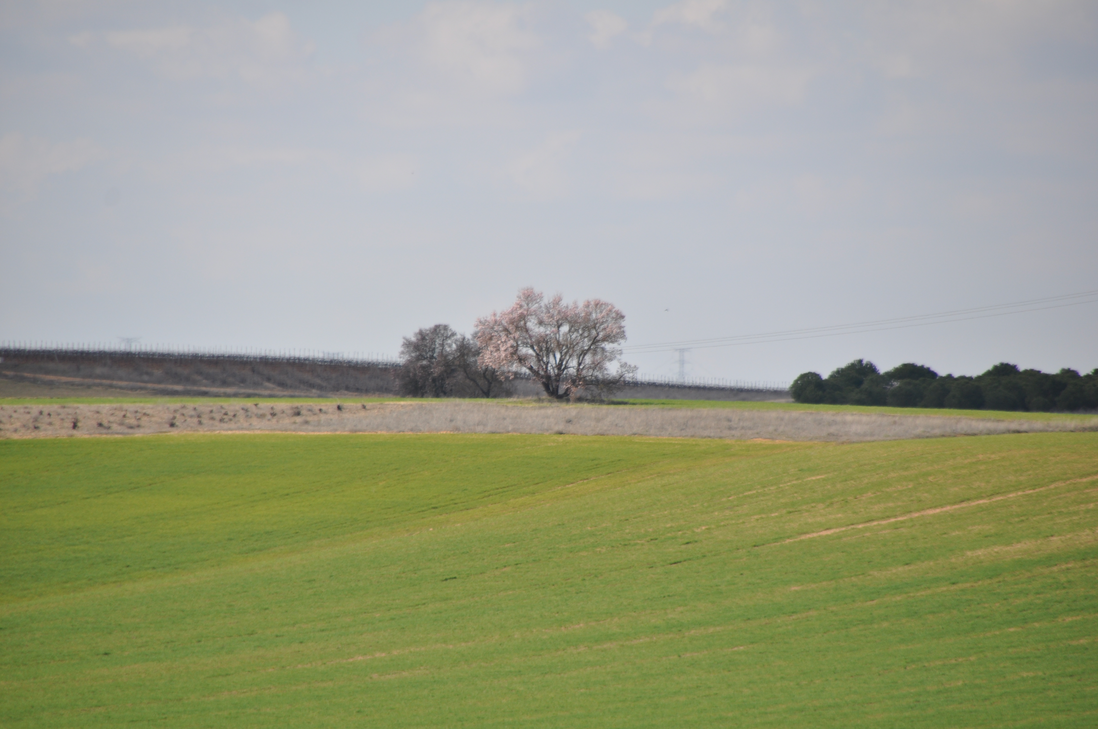 Campos de Ventosa de la Cuesta, Valladolid (España).